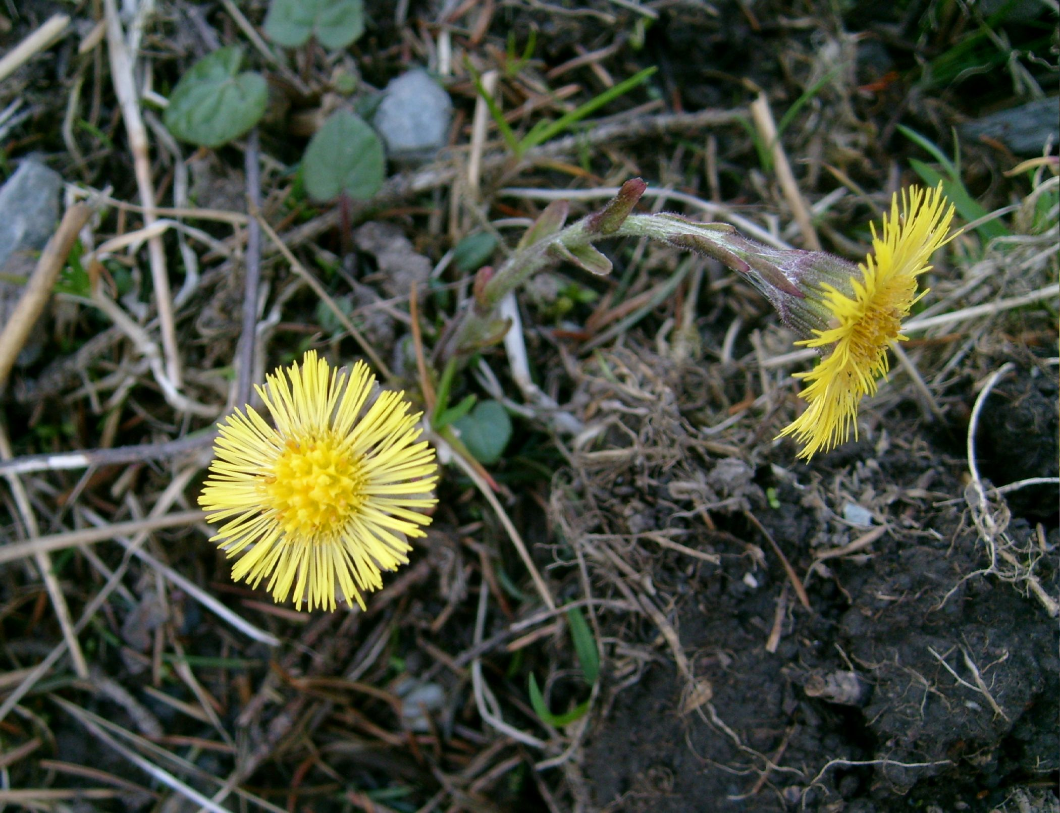 Ieselsfouss - Tussilago farfara L., Botrange, Weerand am héige Fenn, 3.05.2008.